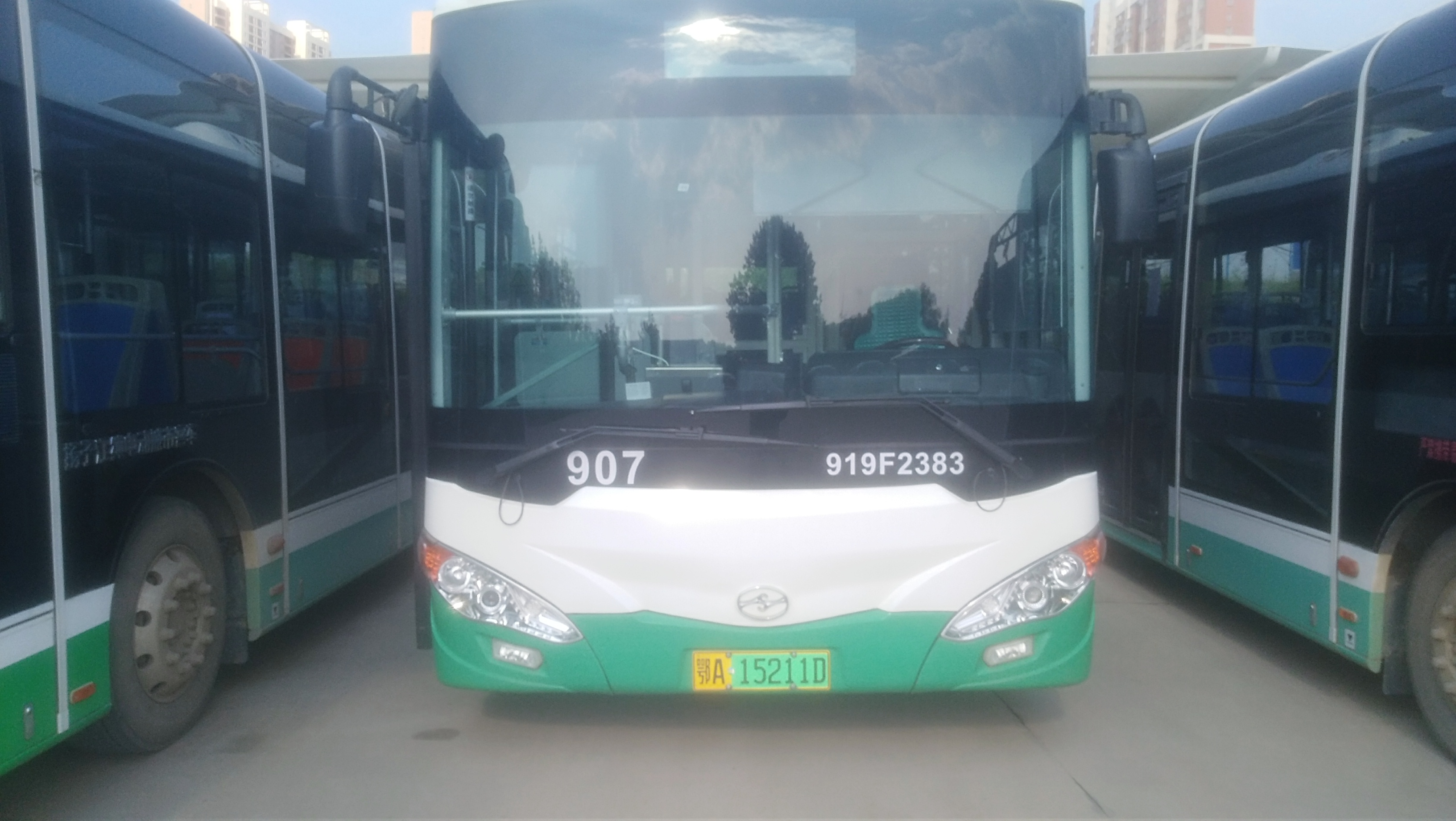 武汉华中牌公交车，一种全正面视角的拍摄方式